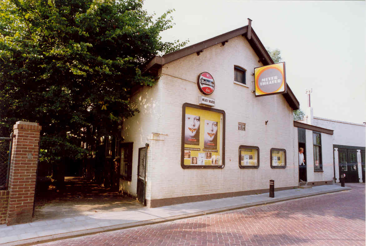 Foto gemaakt door buurman van D. Hoogmoed, Prinses Margrietstraat te Middelharnis.